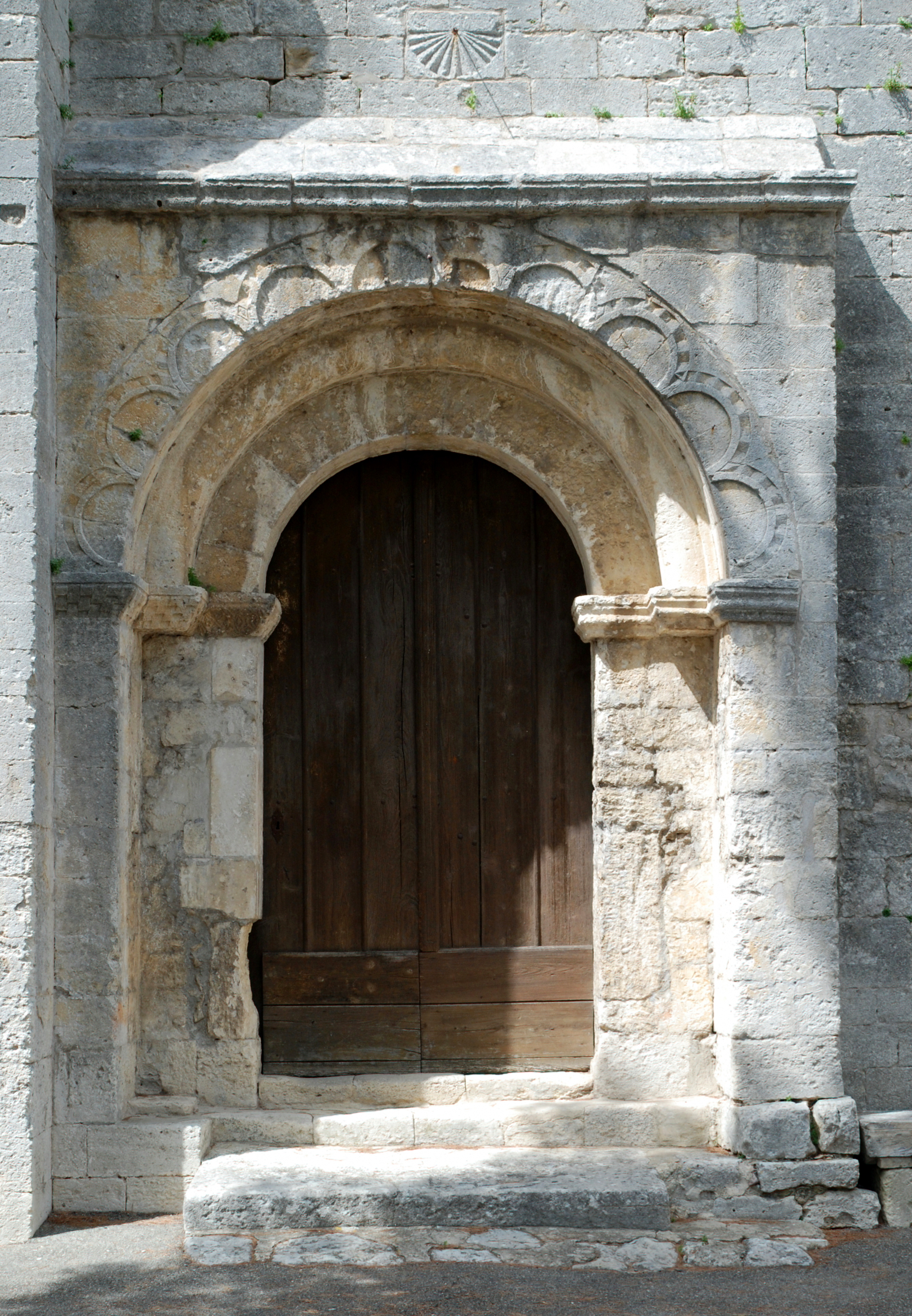 France - Provence - St-Marcellin de Boulbon : portail à archivolte polylobée